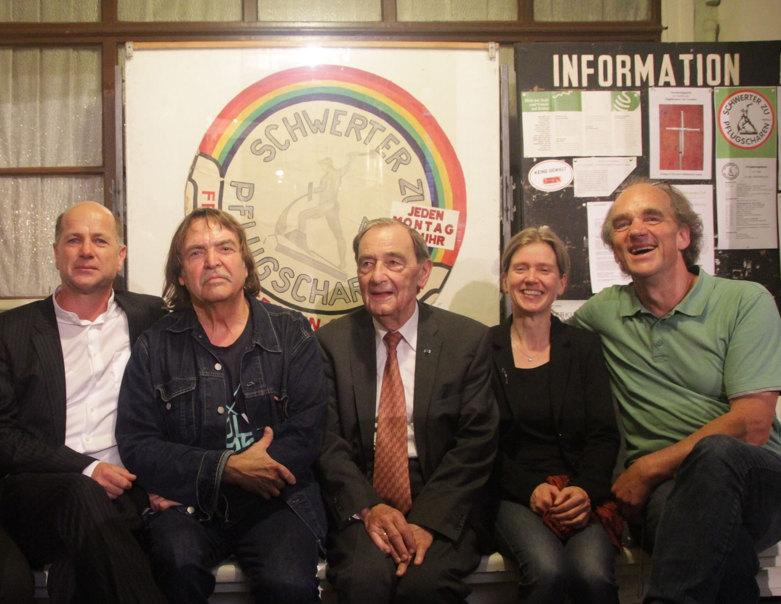 Mitbegründer des wöchentlichen Montags-Friedensgebetes in der Nikolaikirche Leipzig, vlnr: Hans-Joachim Döring, damals Jugenddiakon der Thomasgemeinde, Günter Johannsen, damals Jugenddiakon in Leipzig-Probstheida, Friedrich Magirius damals Superintendent in Leipzig und für die Nikolaikirche mit zuständig, Conny Schneider und André Steidtmann aus der damaligen Jungen Gemeinde Leipzig-Probstheida, André schuf auch das Plakat.